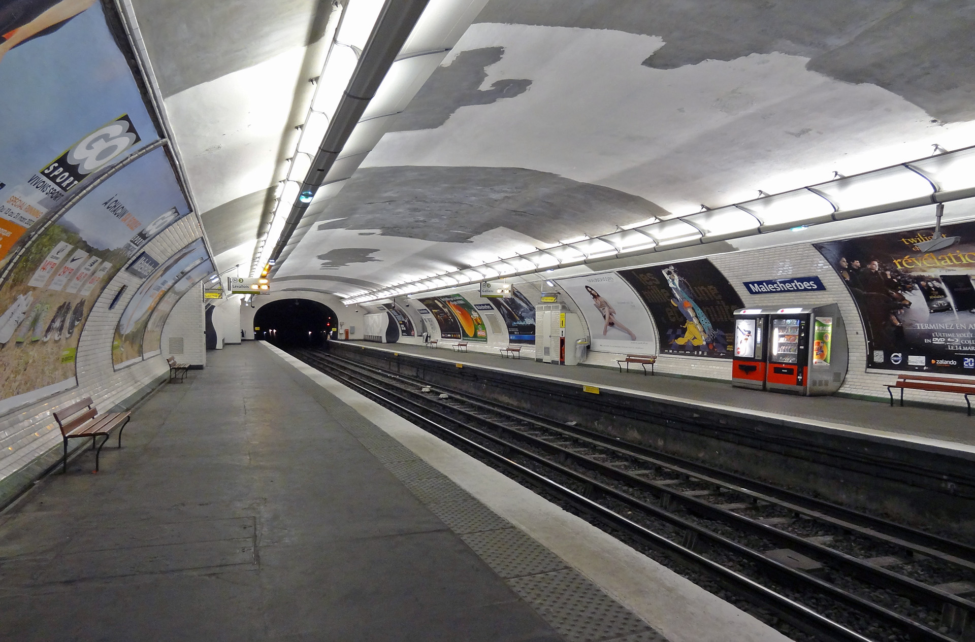 Station Malesherbes de la ligne 3 du métro de Paris, France.